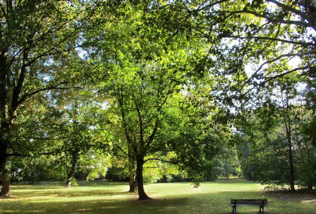 Biegwald - hinter der Sternbrücke